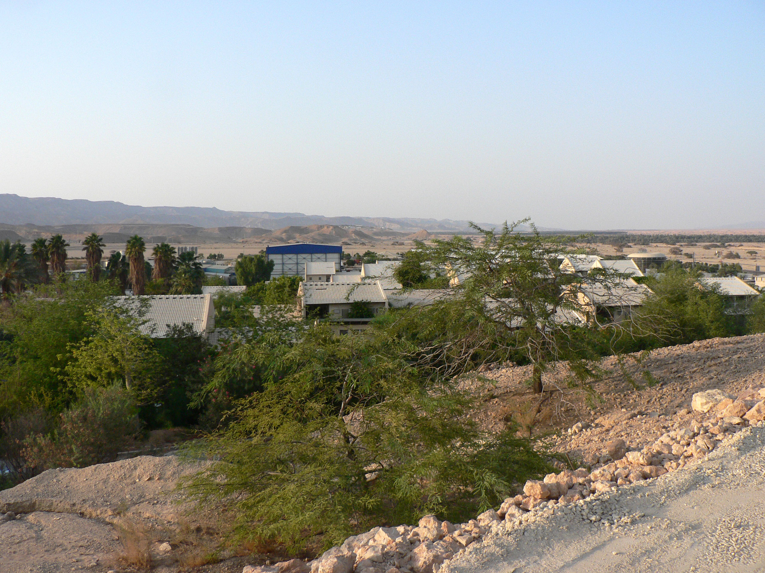 Yotvata, Israel קיבוץ יטבתה